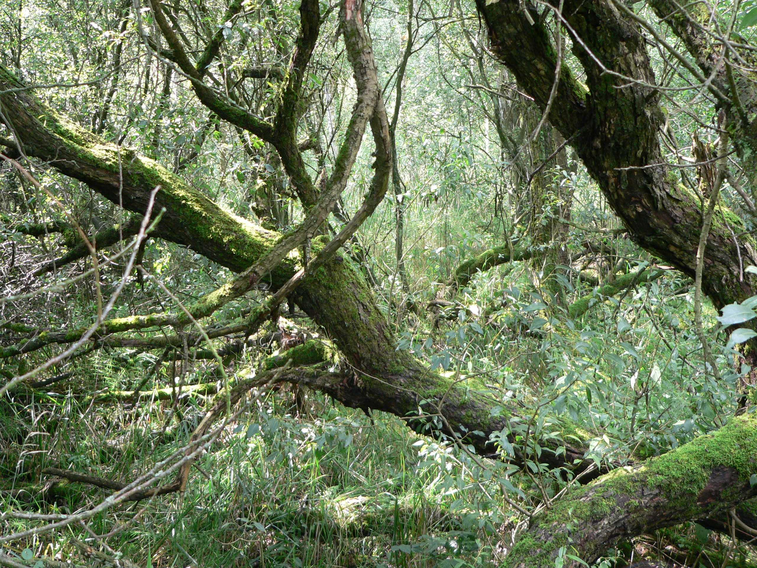 Weidenbruch